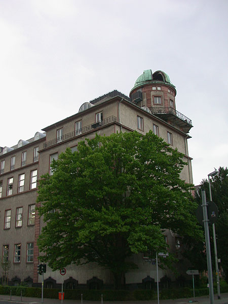 Sternwarte des Physikalischen Vereins Frankfurt am Main